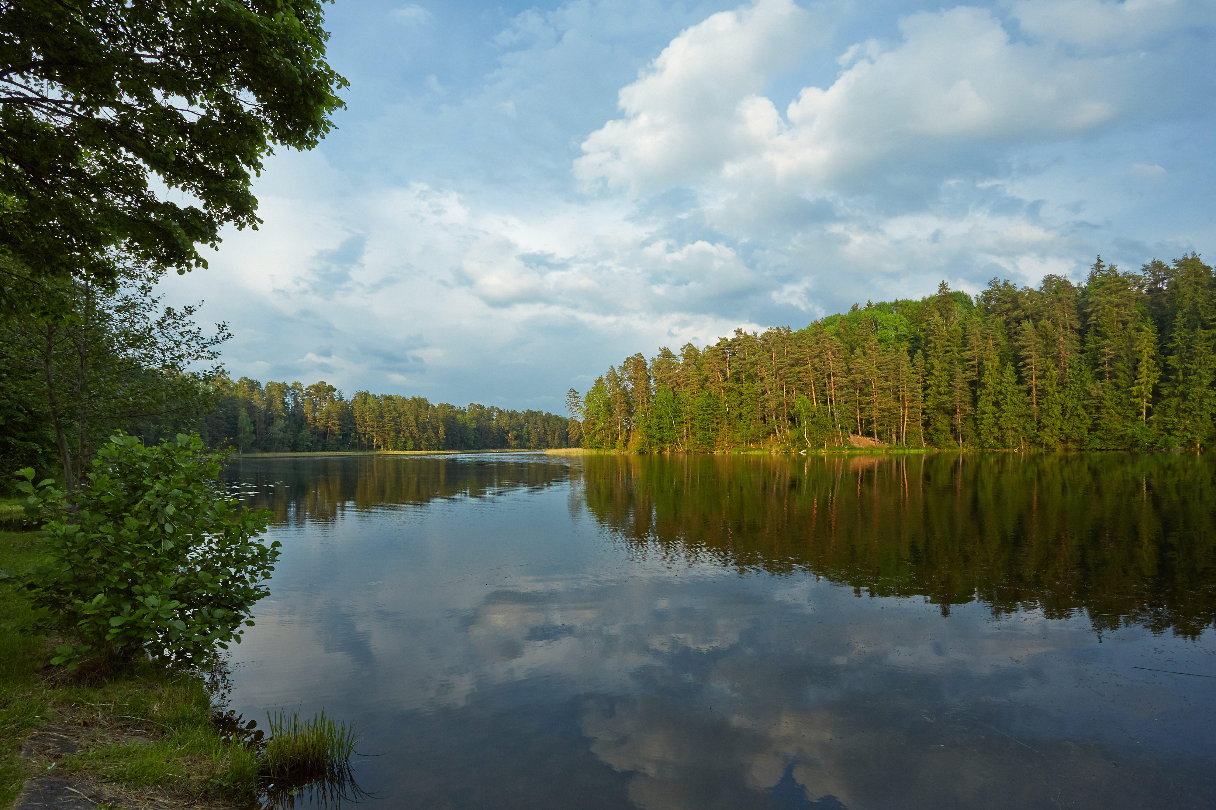 Verijärv Võrumaal